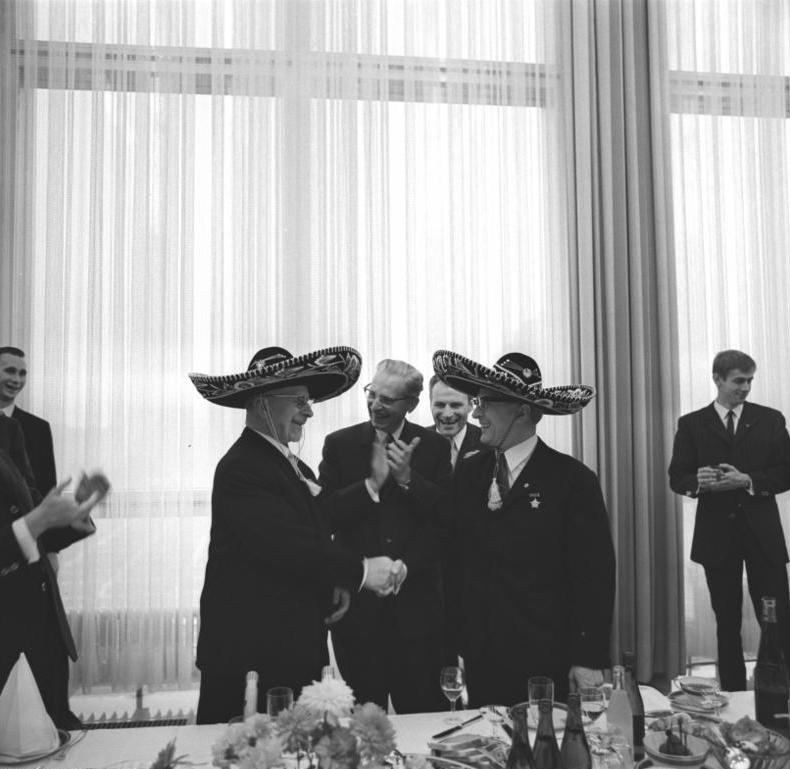 Berlin, Staatsrat ehrte Olympiamannschaft Zentralbild Brüggmann 8.11.68 Berlin: Staatsrat ehrte erfolgreiche Olympia-Mannschaft am 8.11.68 im Amtssitz des Staatsrates. Stürmisch applaudierter Höhepunkt auf dem Empfang für die Teilnahmer an den Olympischen Sommerspielen 1968 in Mexico-Stadt: Mexikanische Sombreros für die Repräsentanten der DDR Walter Ulbricht (l.) und Erich Honecker (r.) - Erinnerungsgeschenke unserer erfolgreichen Olympia-Mannschaft. Bildmitte: Dr. Heinz Schöbel, Mitglied des IOC und Präsident des NOK der DDR, und Rudi Hellmann, Leiter der Abteilung Sport des ZK der SED. Abgebildete Personen: Schöbel, Heinz Dr.: Präsident des NOK, DDR Honecker, Erich: Staatsratsvorsitzender, Generalsekretär des ZK der SED, DDR (GND 118553399) Ulbricht, Walter: Staatsratsvorsitzender, Erster Sekretär des Zentralkomitees (ZK) der SED, Vorsitzender des Nationalen Verteidigungsrates, DDR